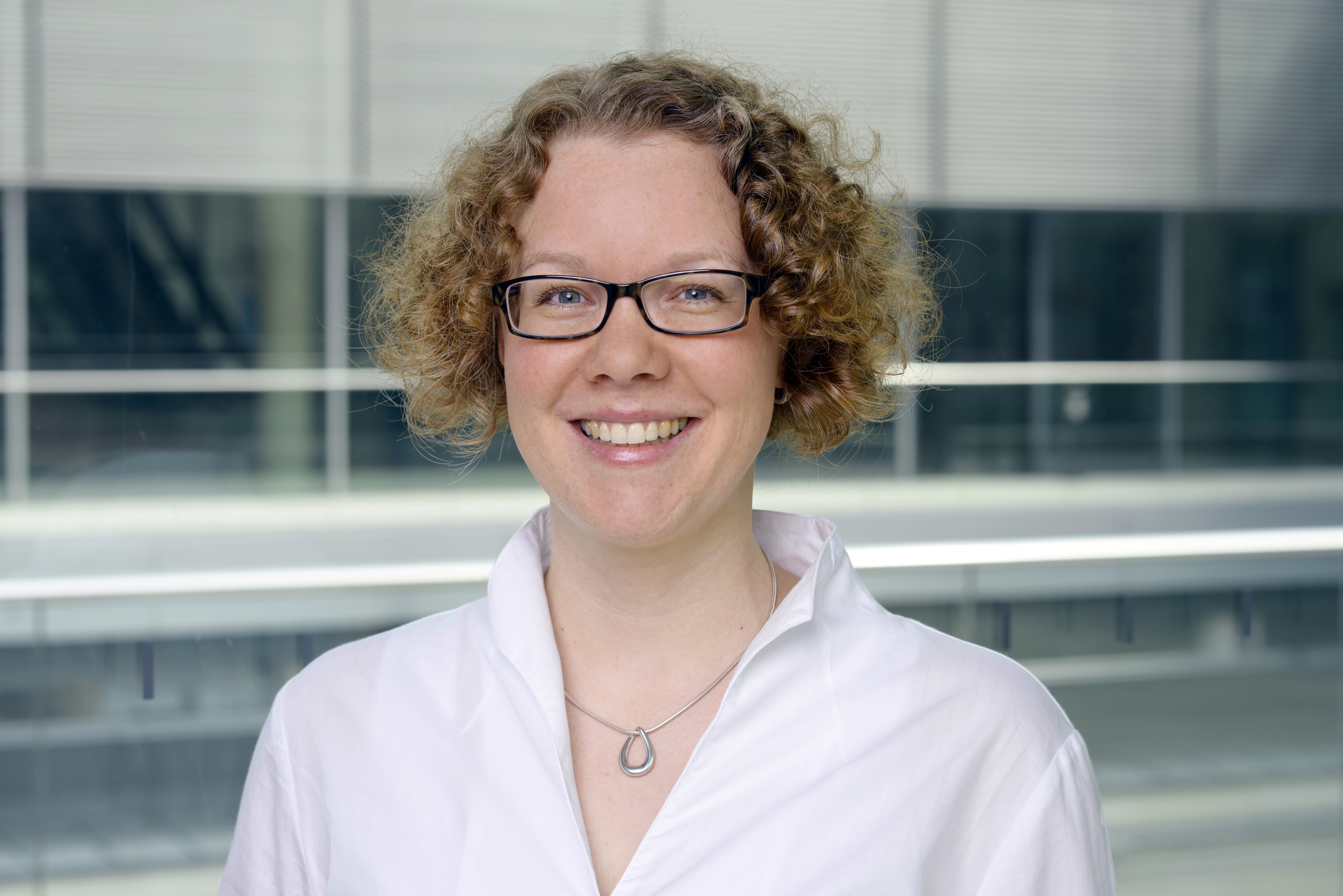 Sprecherin für Energiepolitik Bündnis 90/Die Grünen im Bundestag